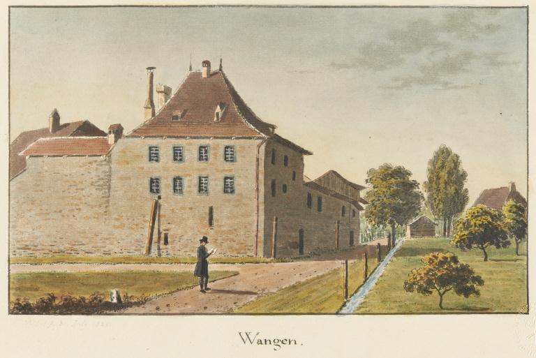 SNB, GUGE-WEIBEL-D-150b